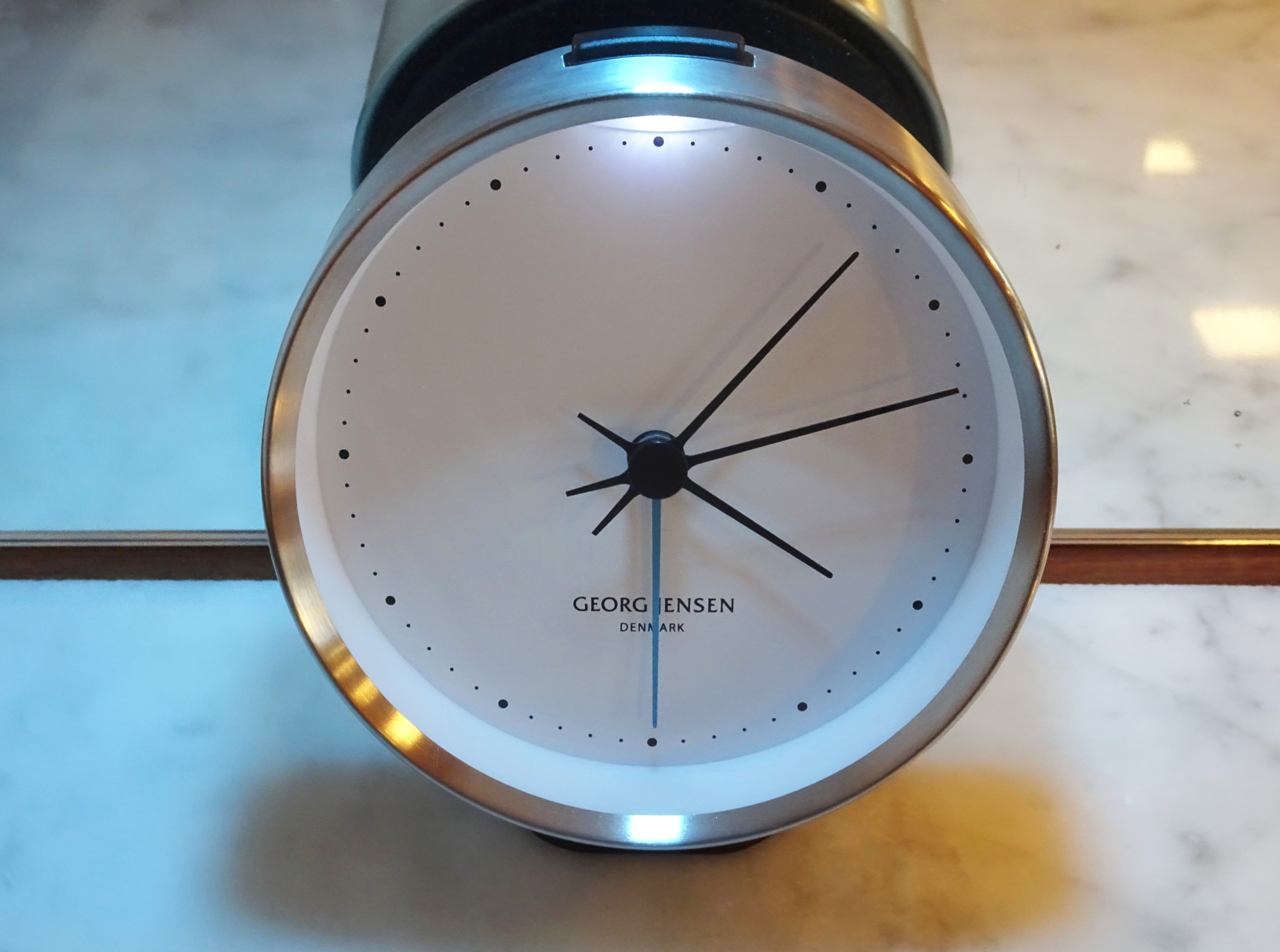 Georg Jensens väckarklocka, design Hennig Koppel